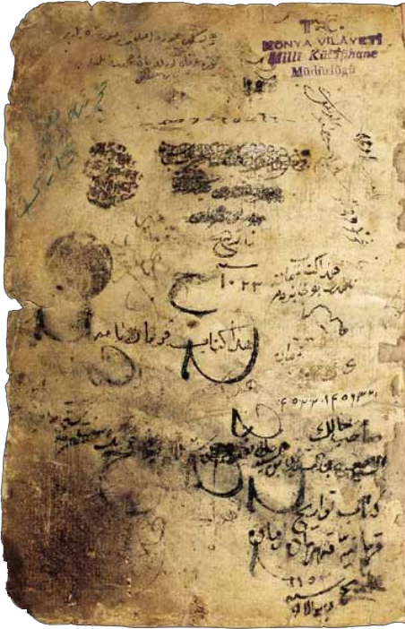 Şikârî'nin Karamannâme eserinin 1614'te yazılan Konya nüshası.